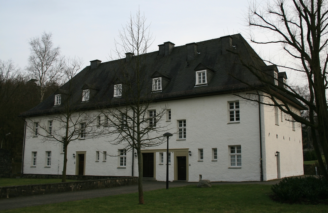 Ehemaliges Kloster Rumbeck in Arnsberg, Stadtteil Rumbeck.